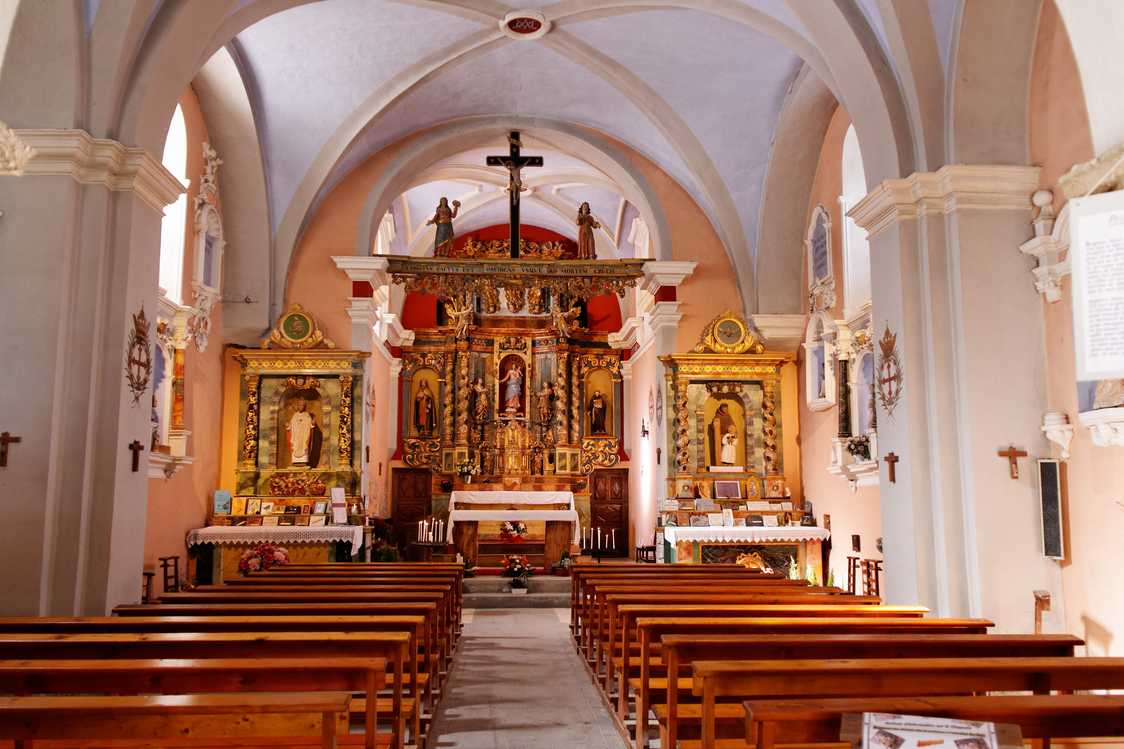 chapelle Notre-Dame de la Gorge, les retables baroques